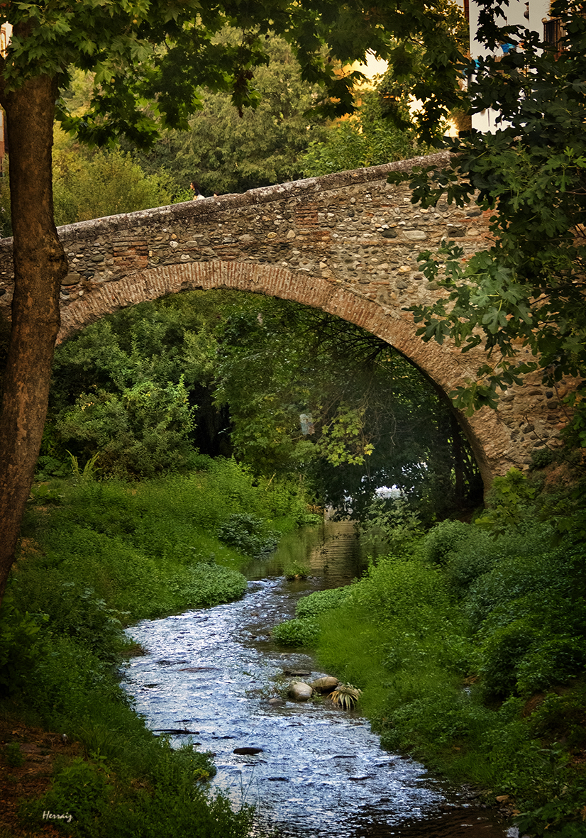 Vista de "La carrera del Darro" en el paseo de los tristes en Granada